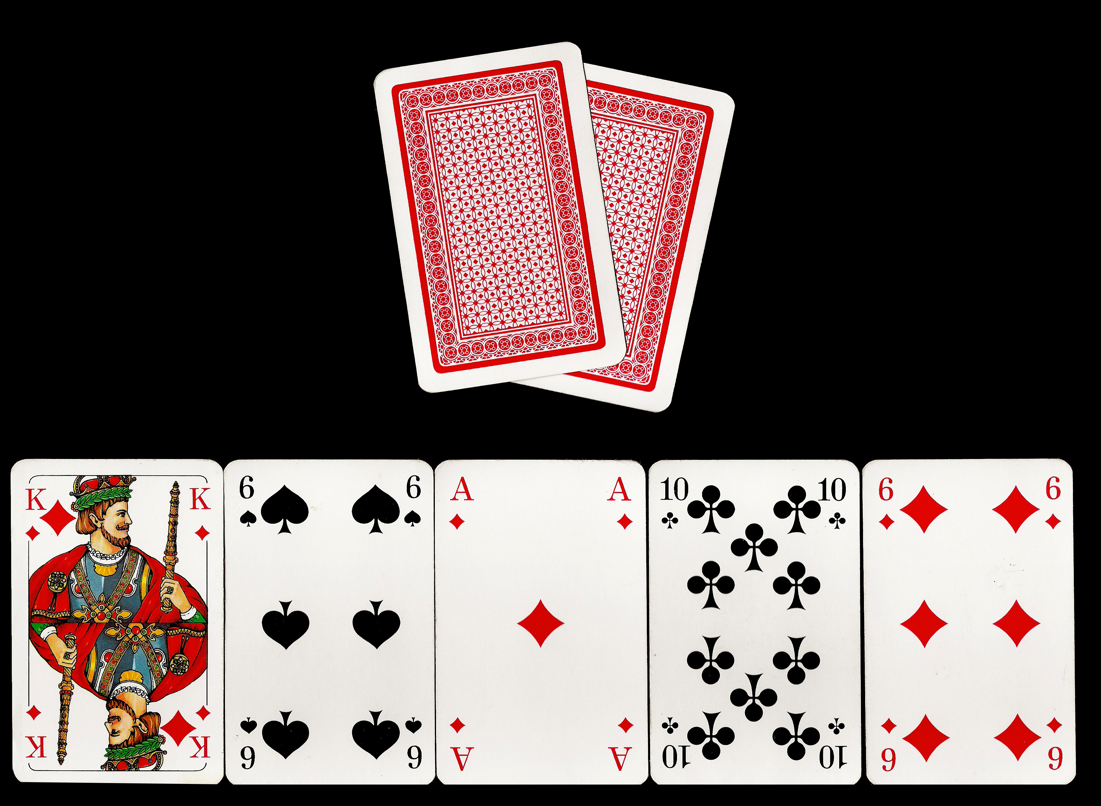 Poker - Karten beim Texas Hold'em